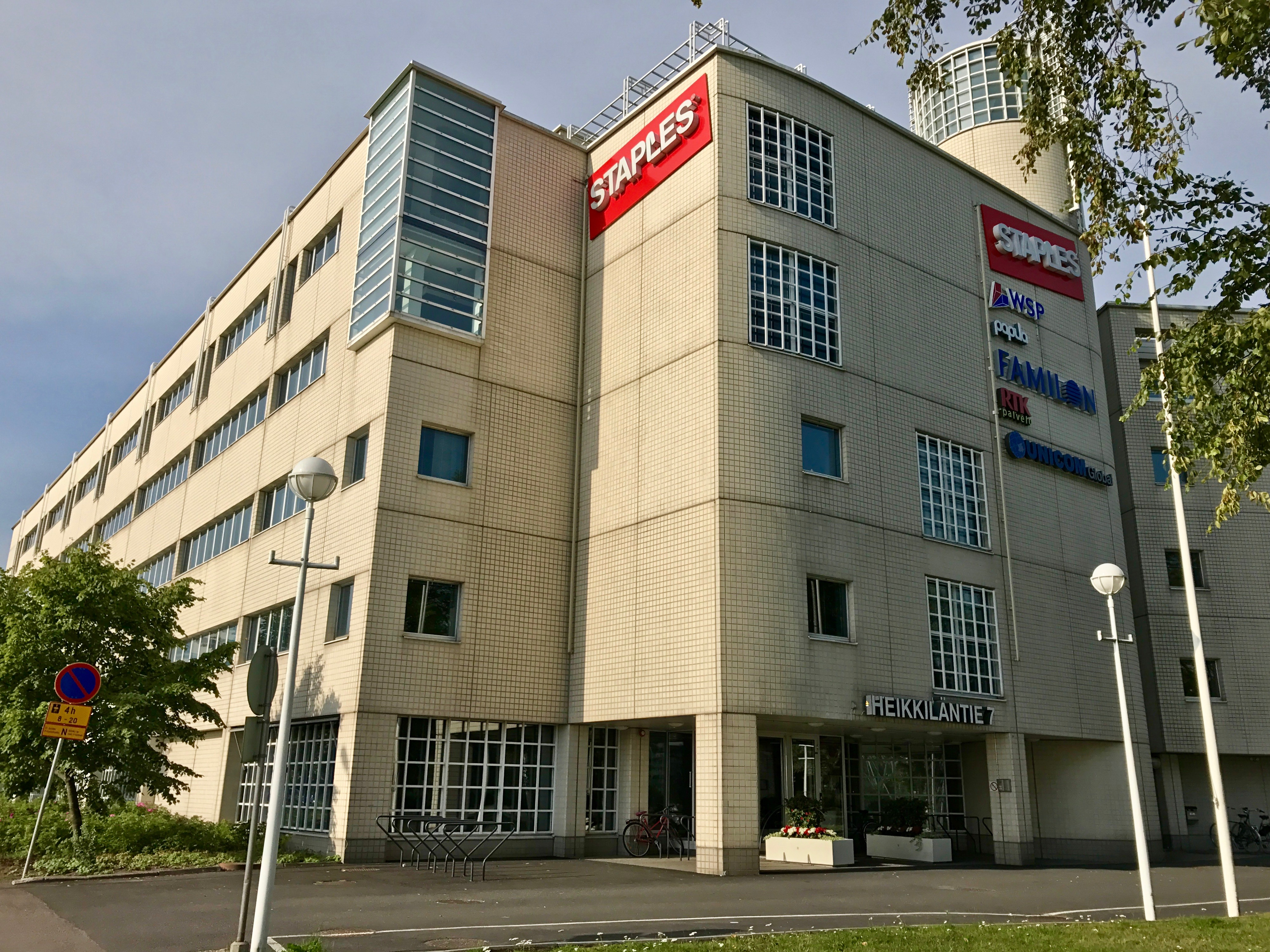 Toimistorakennus Helsingin Lauttasaaressa osoitteessa Heikkiläntien 7.